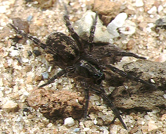 female Arctosa japonica from Okinawa.